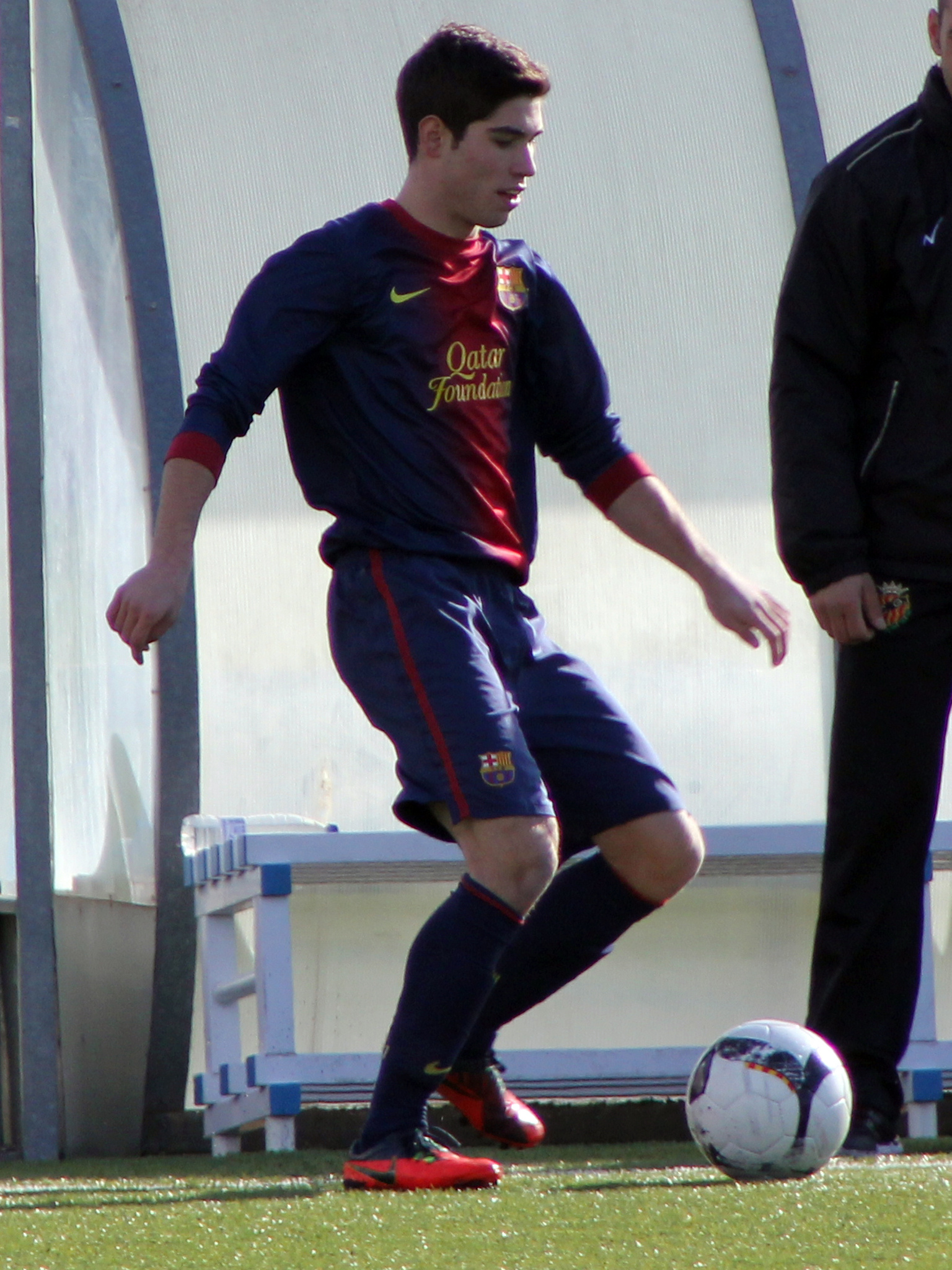 Foto realizada por Javier Segura (@castroquini)